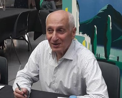 Michelo Ocelot au festival international d'animation d'Annecy 2018.